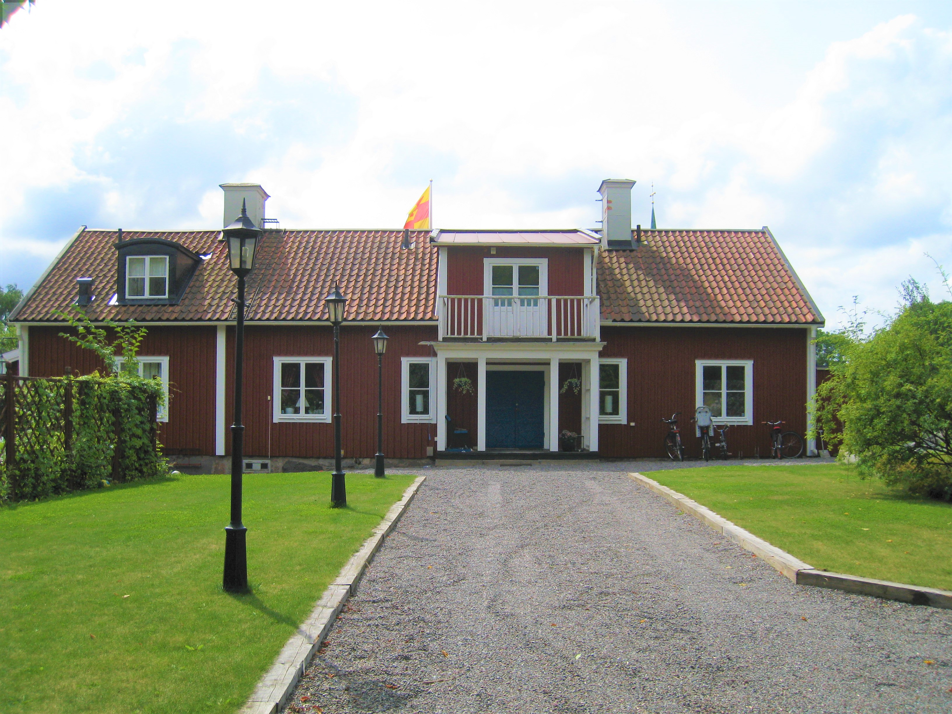 Bromma prästgård (nya prästgården) vid Bromma kyrka, Bromma, Stockholm, vy från gårdssidan. Nya prästgården vid Bromma kyrka byggdes 1848-1850. (Den gamla prästgårdsbyggnaden, som uppfördes omkring år 1600, är den nuvarande Sockenstugan och ligger bredvid den nya prästgården.)